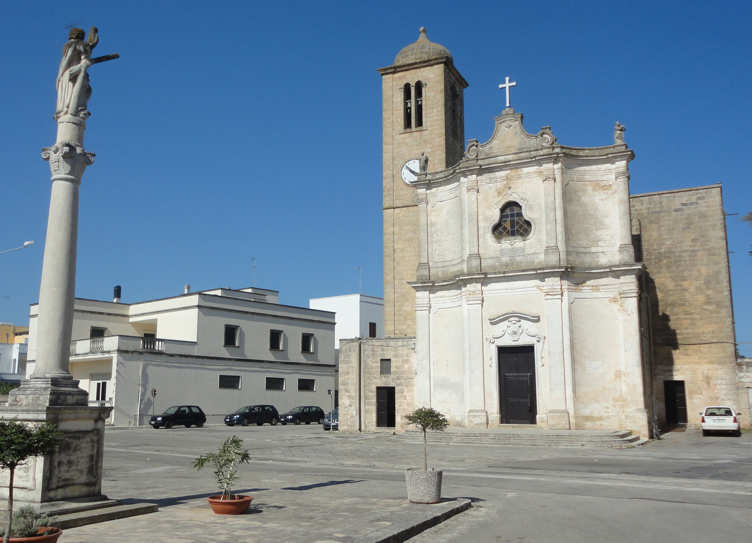 Piazza Sant'Andrea Caprarica del Capo, Tricase, Lecce